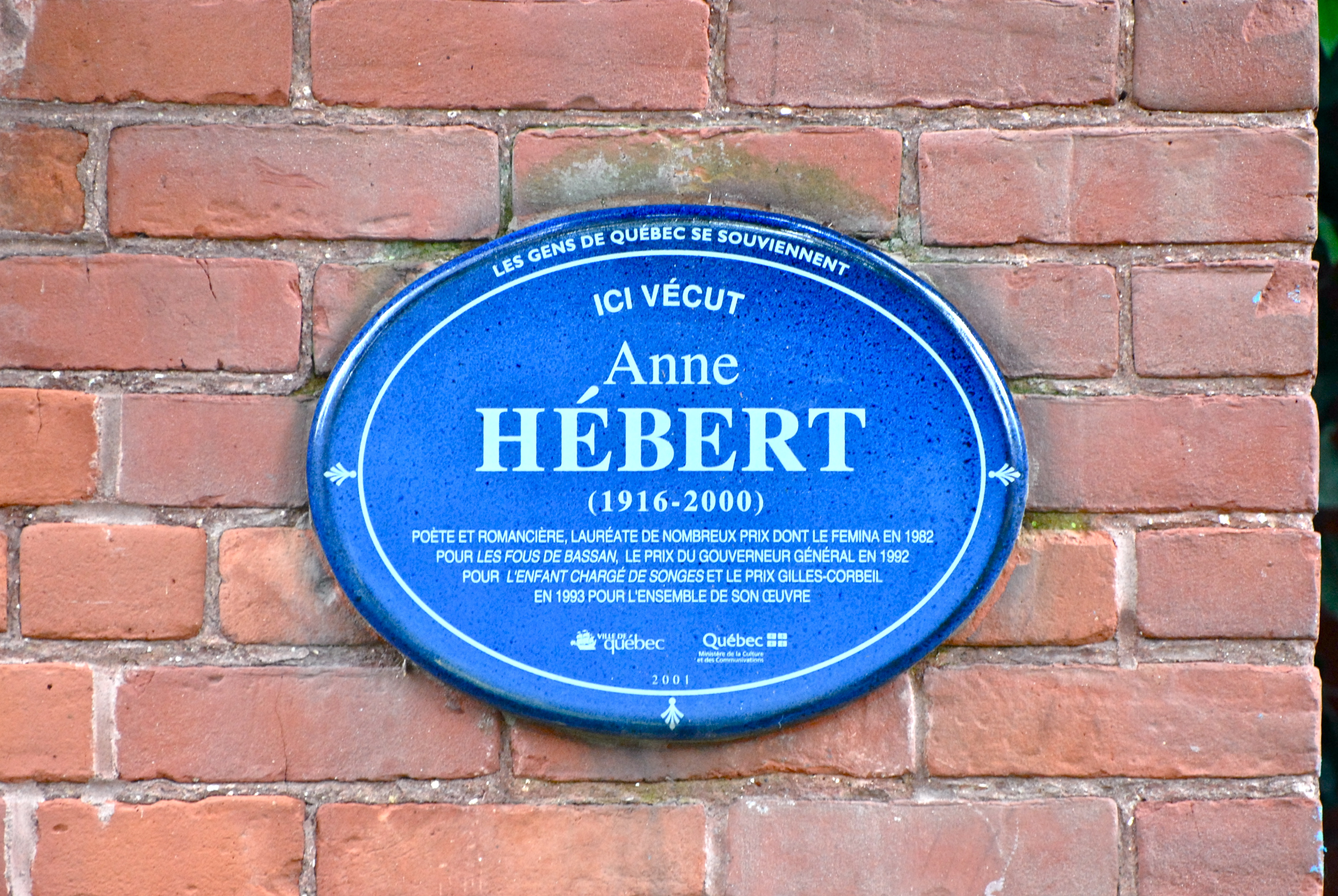 Plaque en mémoire d'Anne Hébert, sur une maison de l'avenue du Parc, à Québec.La maison